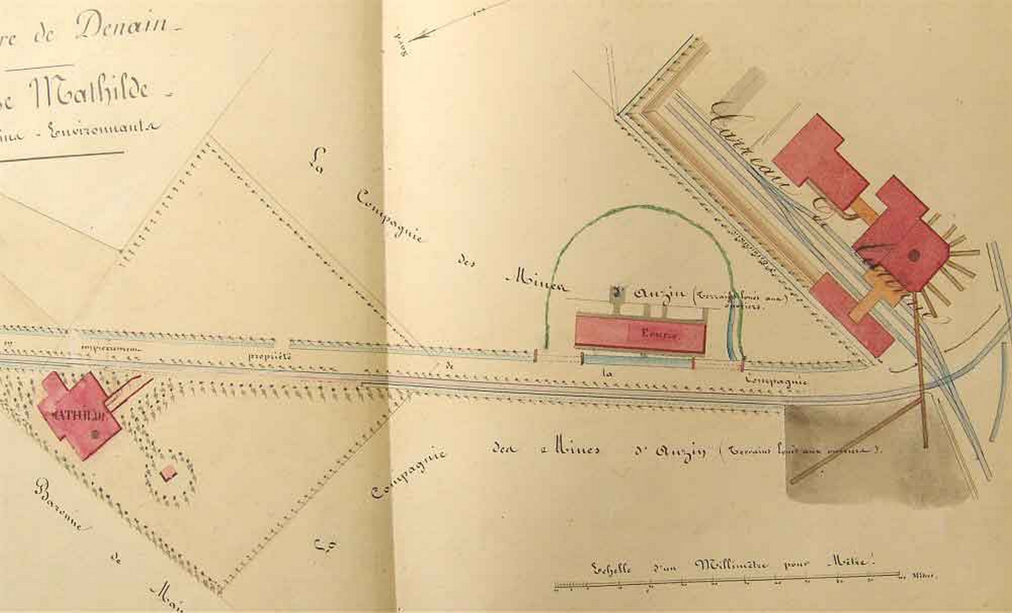 La fosse Mathilde de la Compagnie des mines d'Anzin était un charbonnage du bassin minier du Nord-Pas-de-Calais constitué d'un seul puits situé à Denain, Nord, Nord-Pas-de-Calais, France.